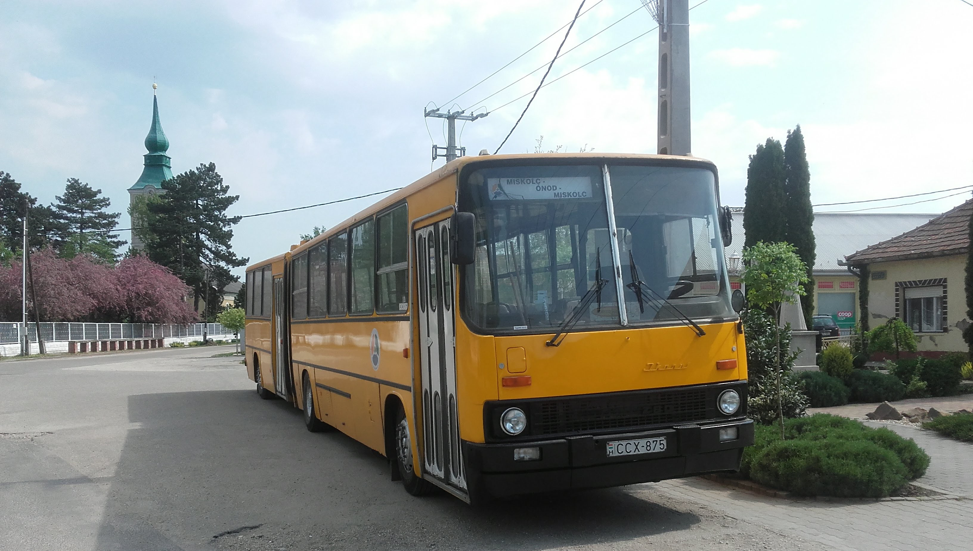 Az ÉMKK CCX-875 rendszámú Ikarus 280 típusú busza Ónodon, a 3735-ös helyközi járaton.